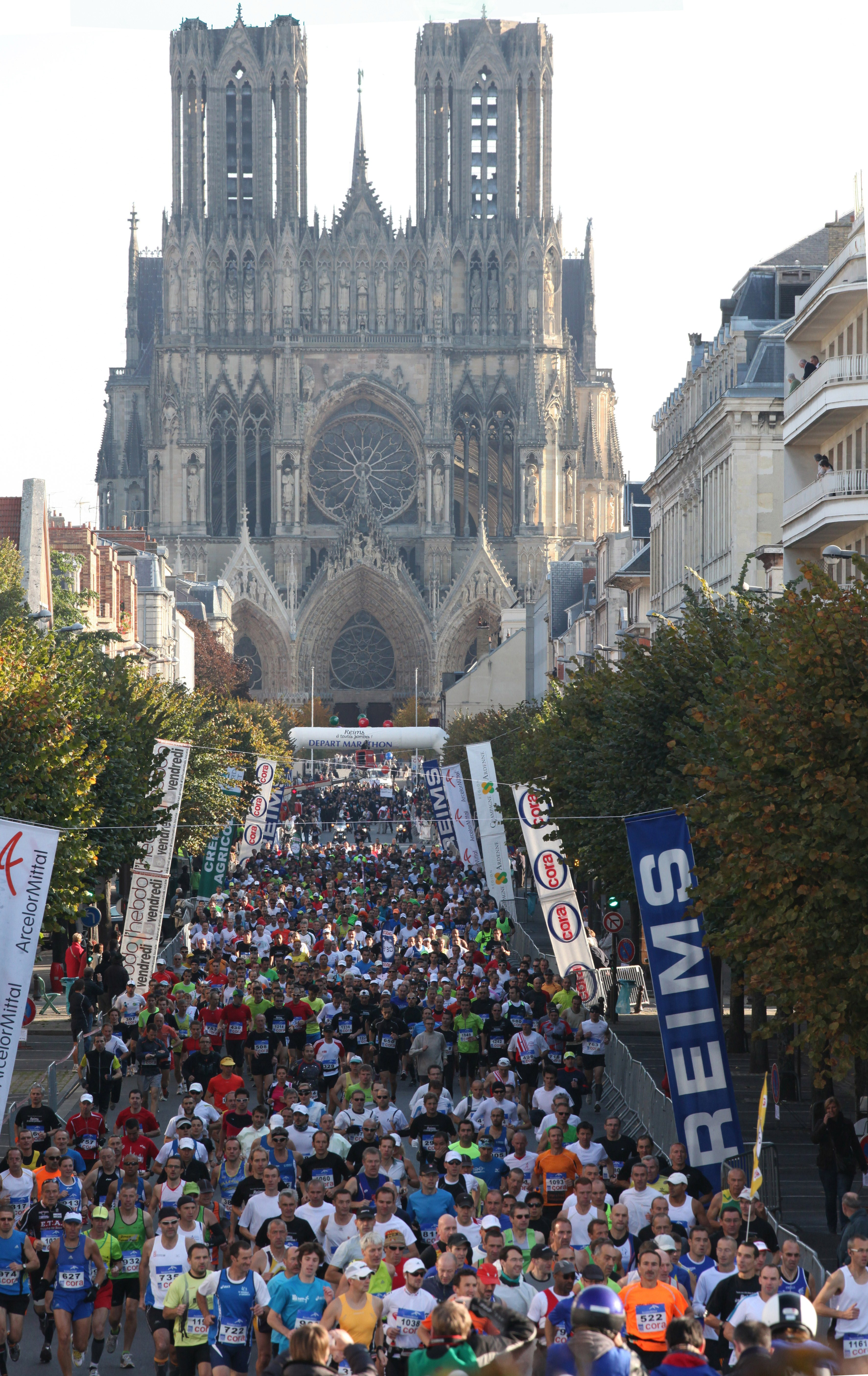 Marathon de Reims avec la cathédrale en fond, don de l'Office des sports .